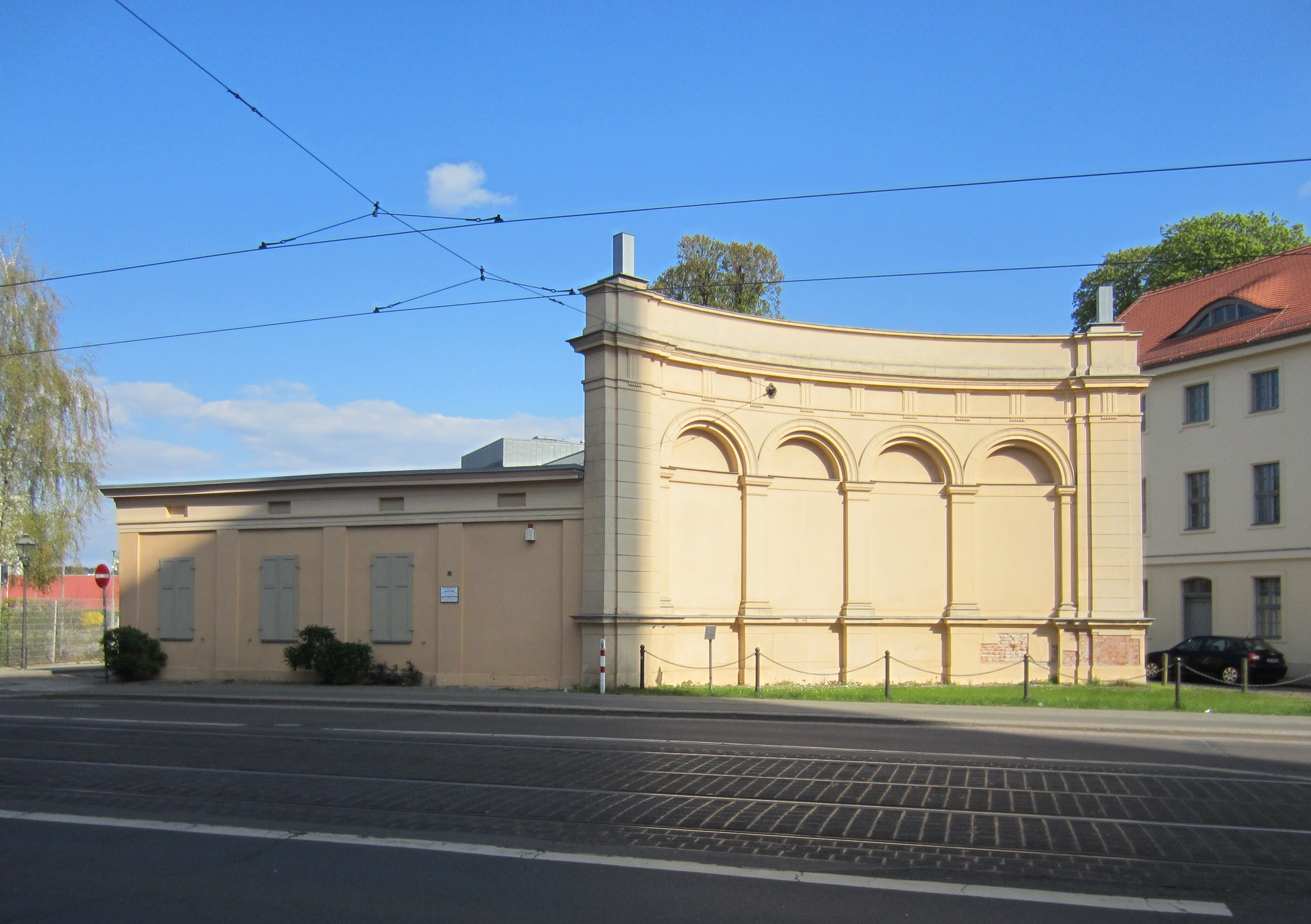 Denkmalgeschützte Reste des ehemaligen Berliner Tors in Potsdam